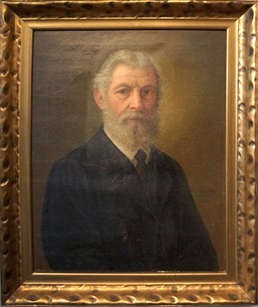 Heinrich Kluibenschedl Selbstporträt, (Öl, 1923, 60 x 47 cm), Privatbesitz